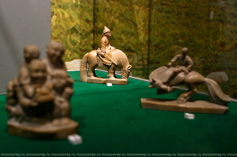 Выставка "Тува в беге времени"